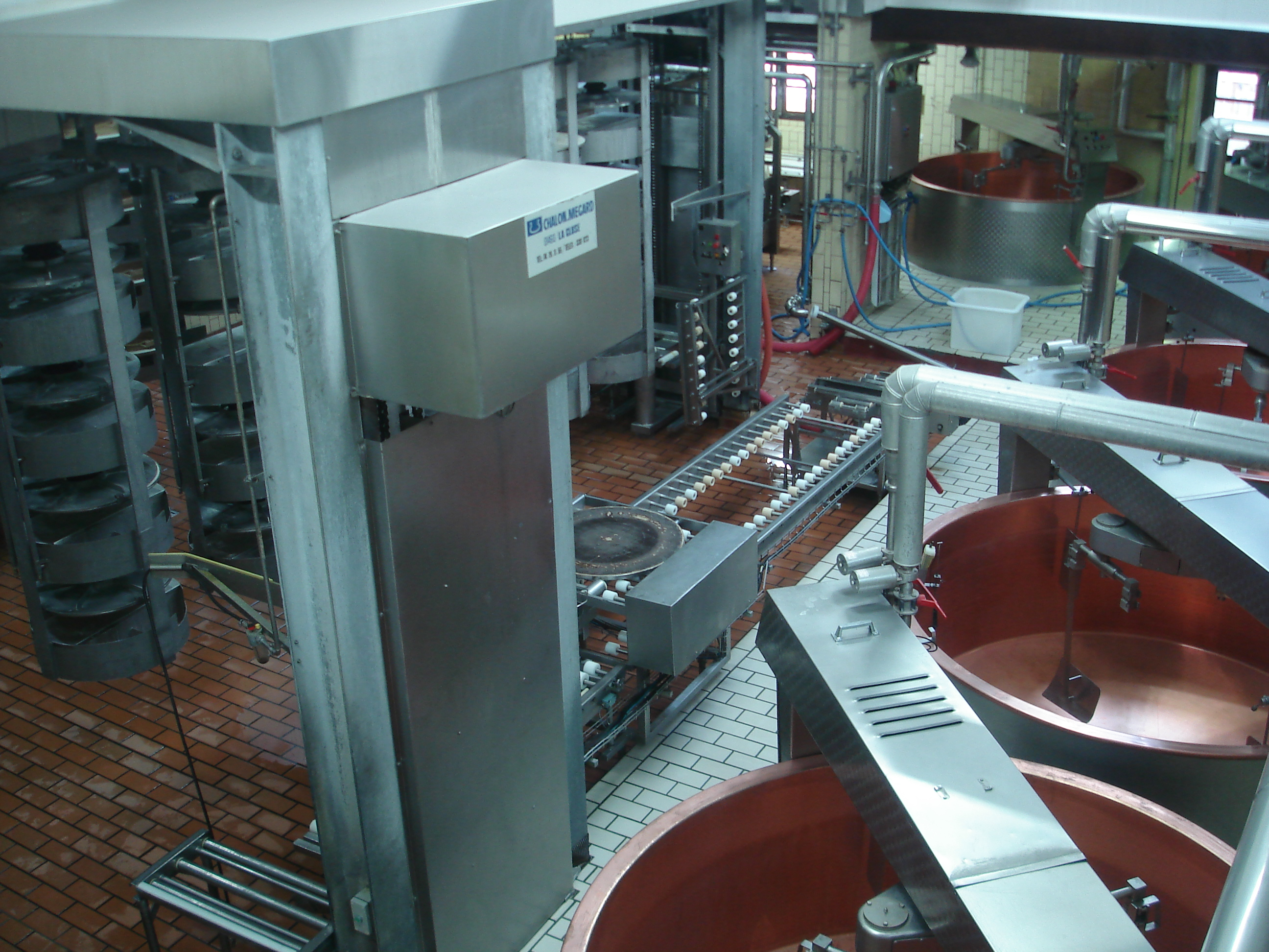 Vue d'ensemble de la fabrication industrielle du Beaufort, à la coopérative fromagère de la ville de Beaufort-sur-Doron.